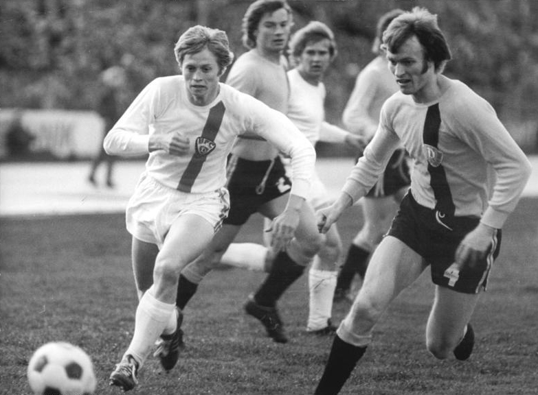 ADN-ZB-Mittelstädt-25.4.75-B- Berlin: Punktspiel der Fussballoberliga: BFC Dynamo - Dynamo Dresden 1:1 (0:1) - Zweikampf zwischen Nationalspieler Riediger (BFC, links) und Schmuck (Dynamo Dresden) vor dem Dresdener Tor.